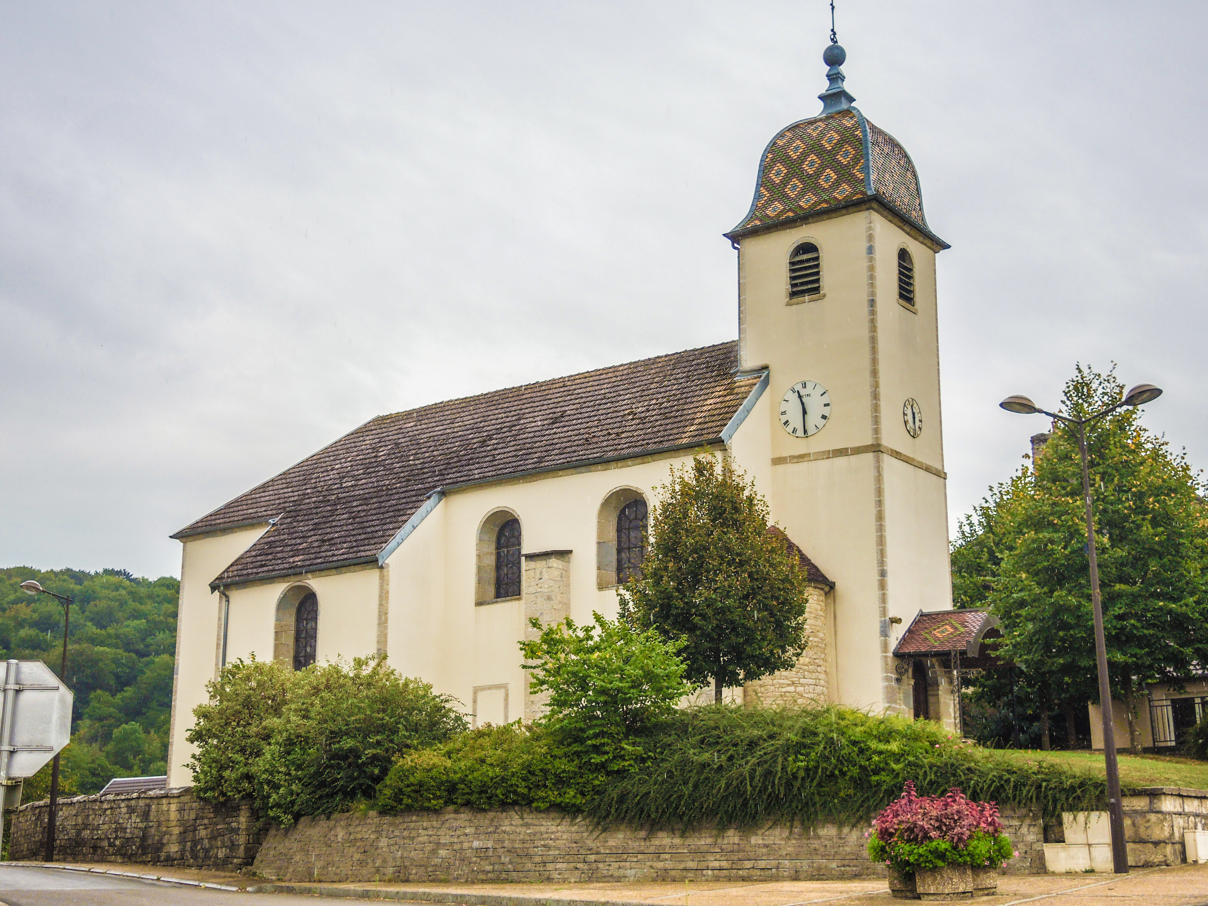 Eglise de Pouligney. Doubs